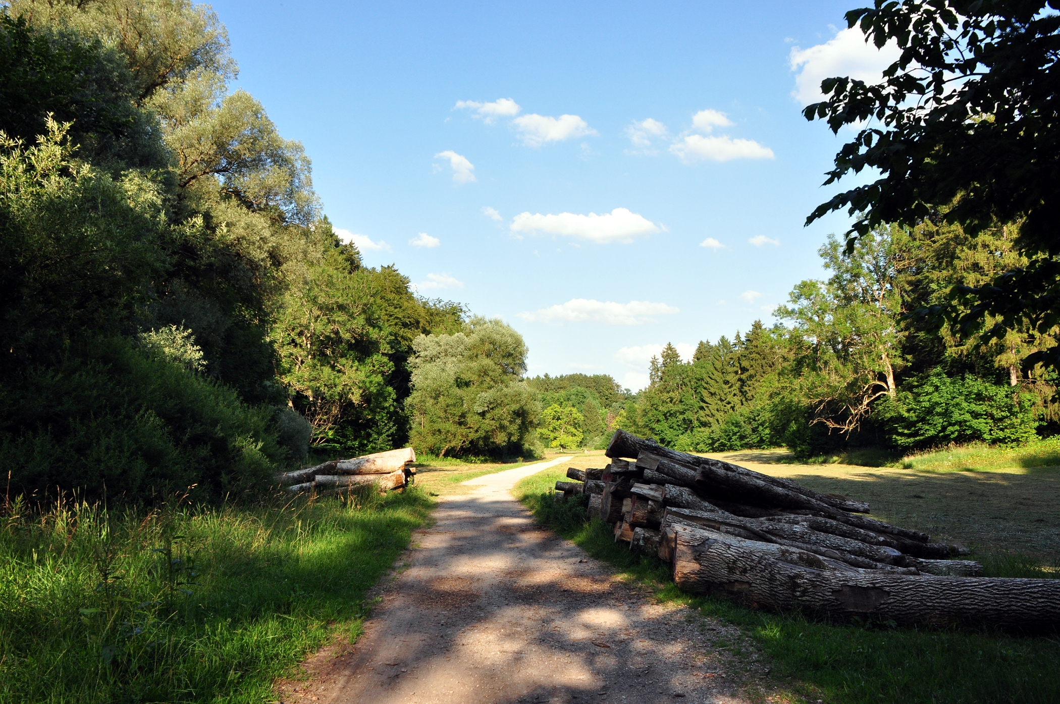 Landschaft am Ende der Maisinger Schlucht, einem Taleinschnitt im Endmoränenzug westlich des Starnberger Sees.